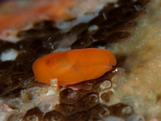 Philine trapezia, 15 m de profundidad, Parque Marino de Izu, Japón